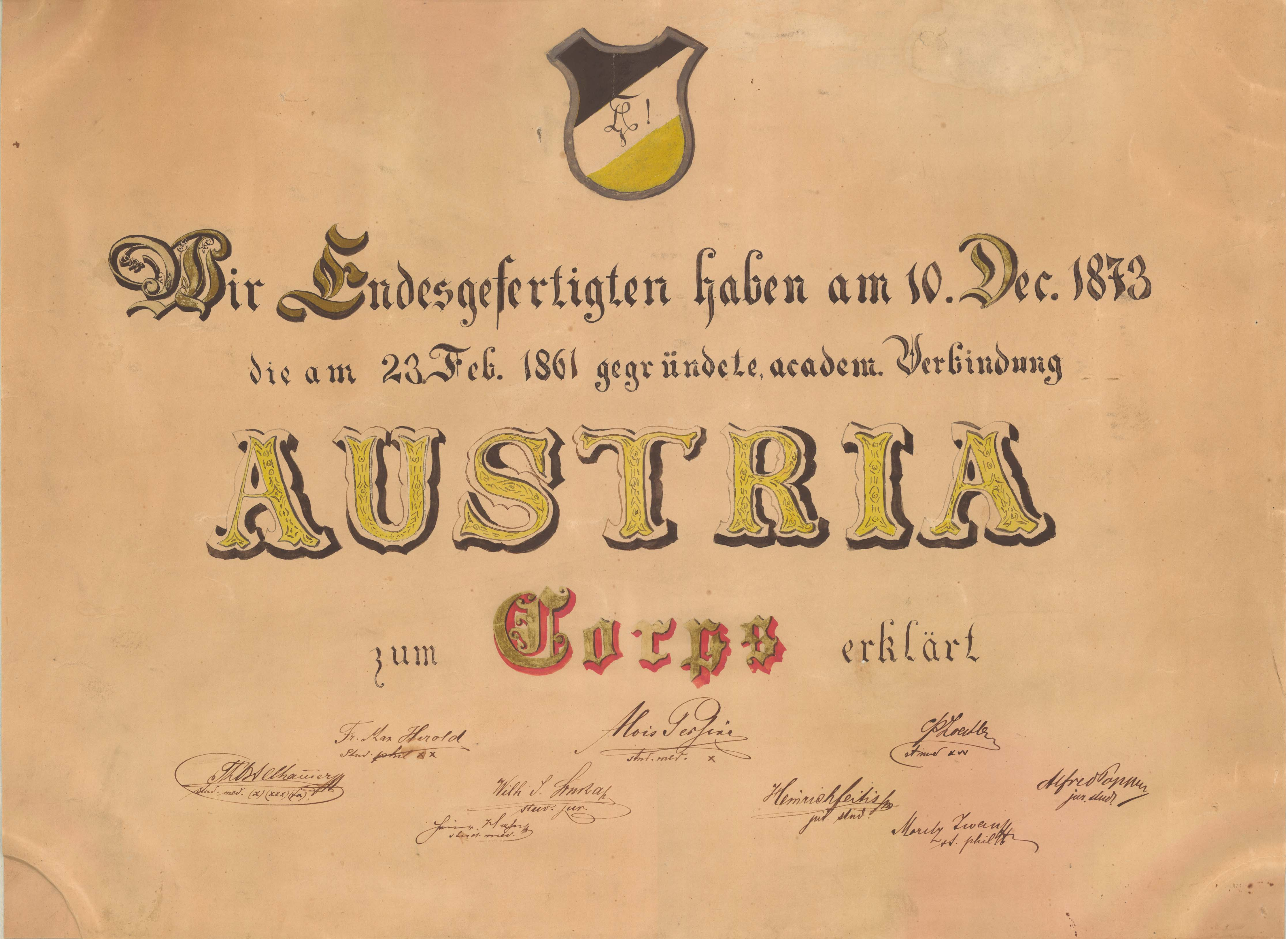 Corpserklärung